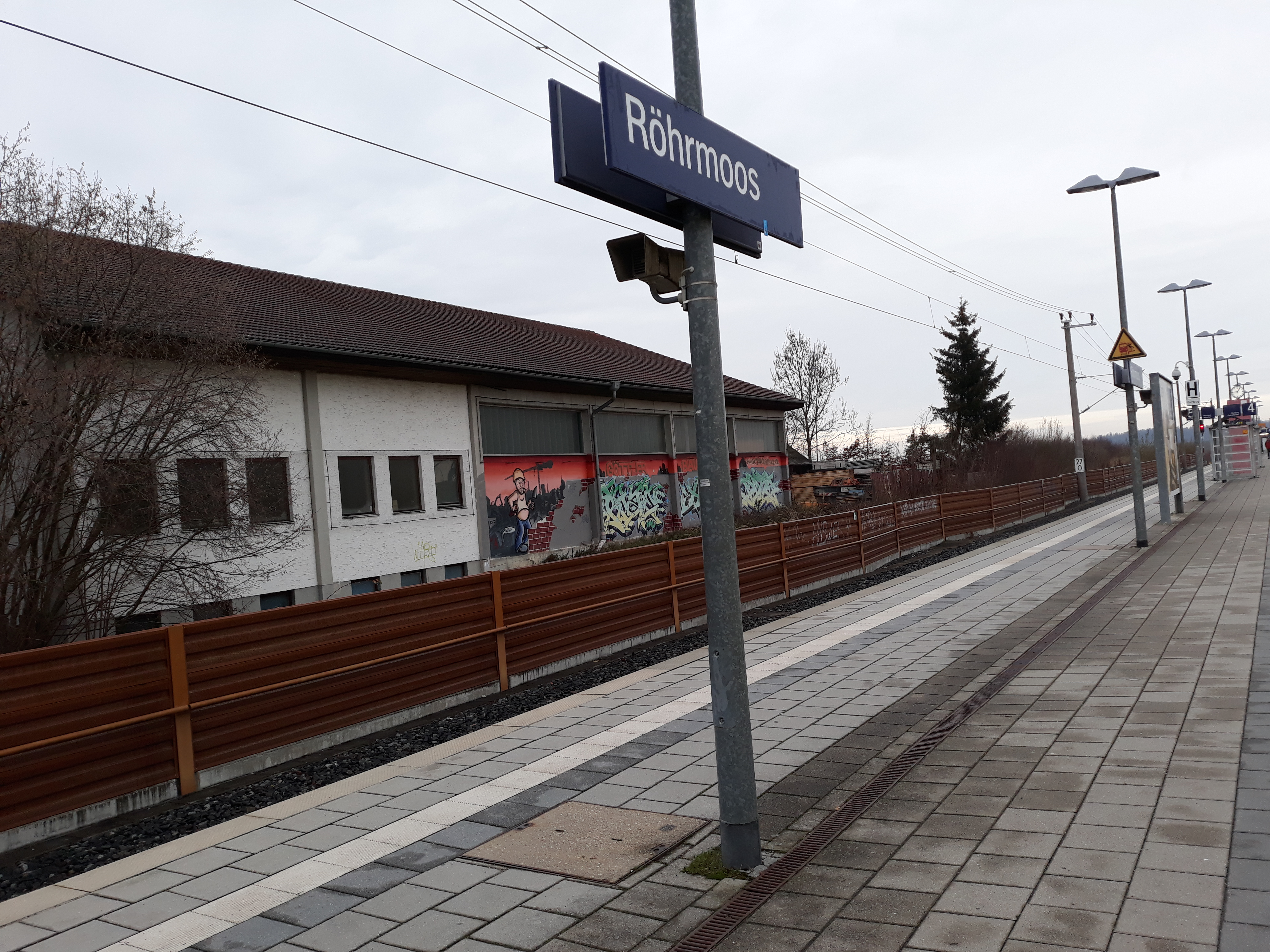 S-Bahnhof Röhrmoos im Landkreis Dachau in Bayern